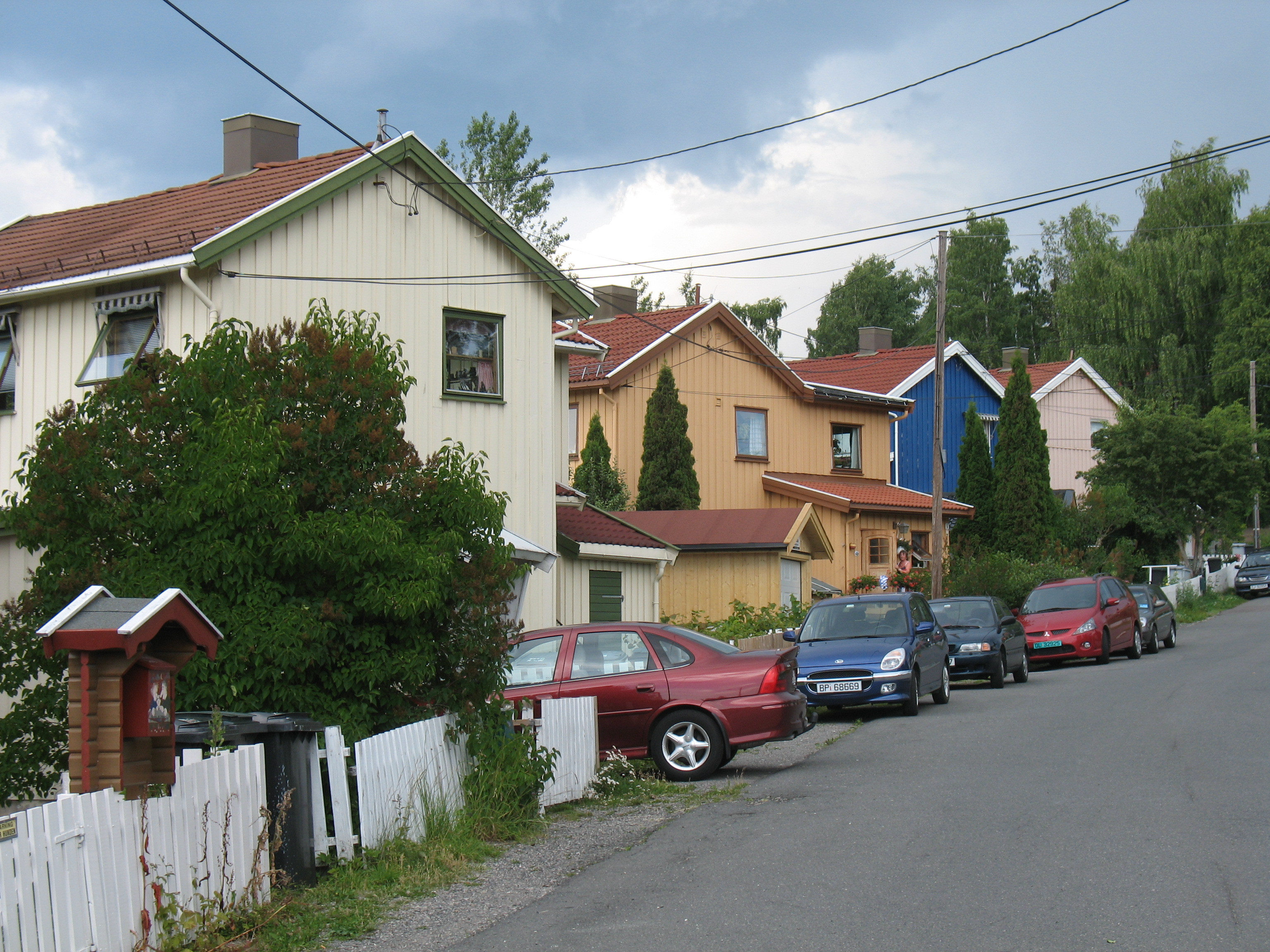 Ulsrud hageby (i Ulsrudfaret) på Ulsrud i Oslo